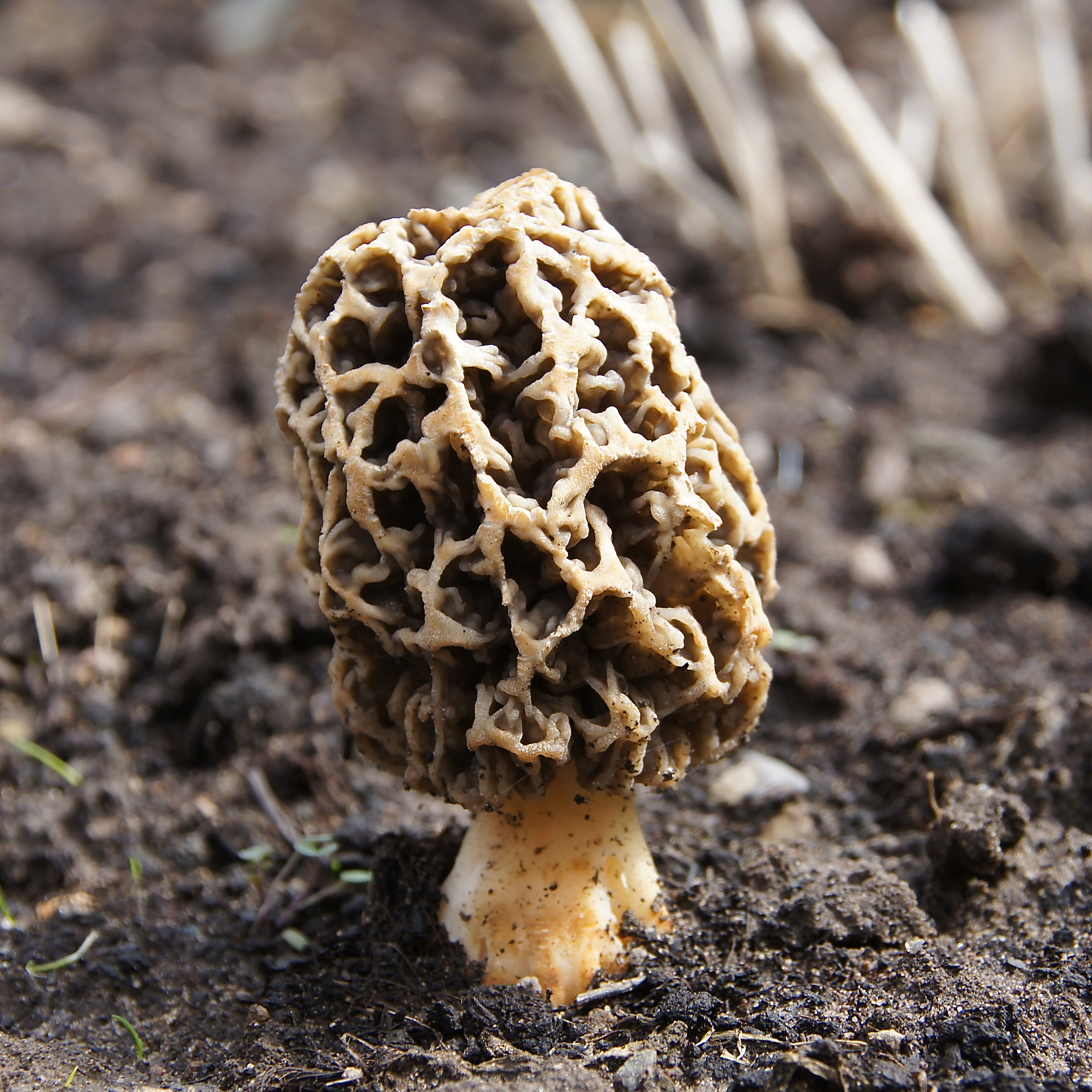 Morchella esculenta Fundort: DE - TH - LK SM Fundtag: 2013-05-01